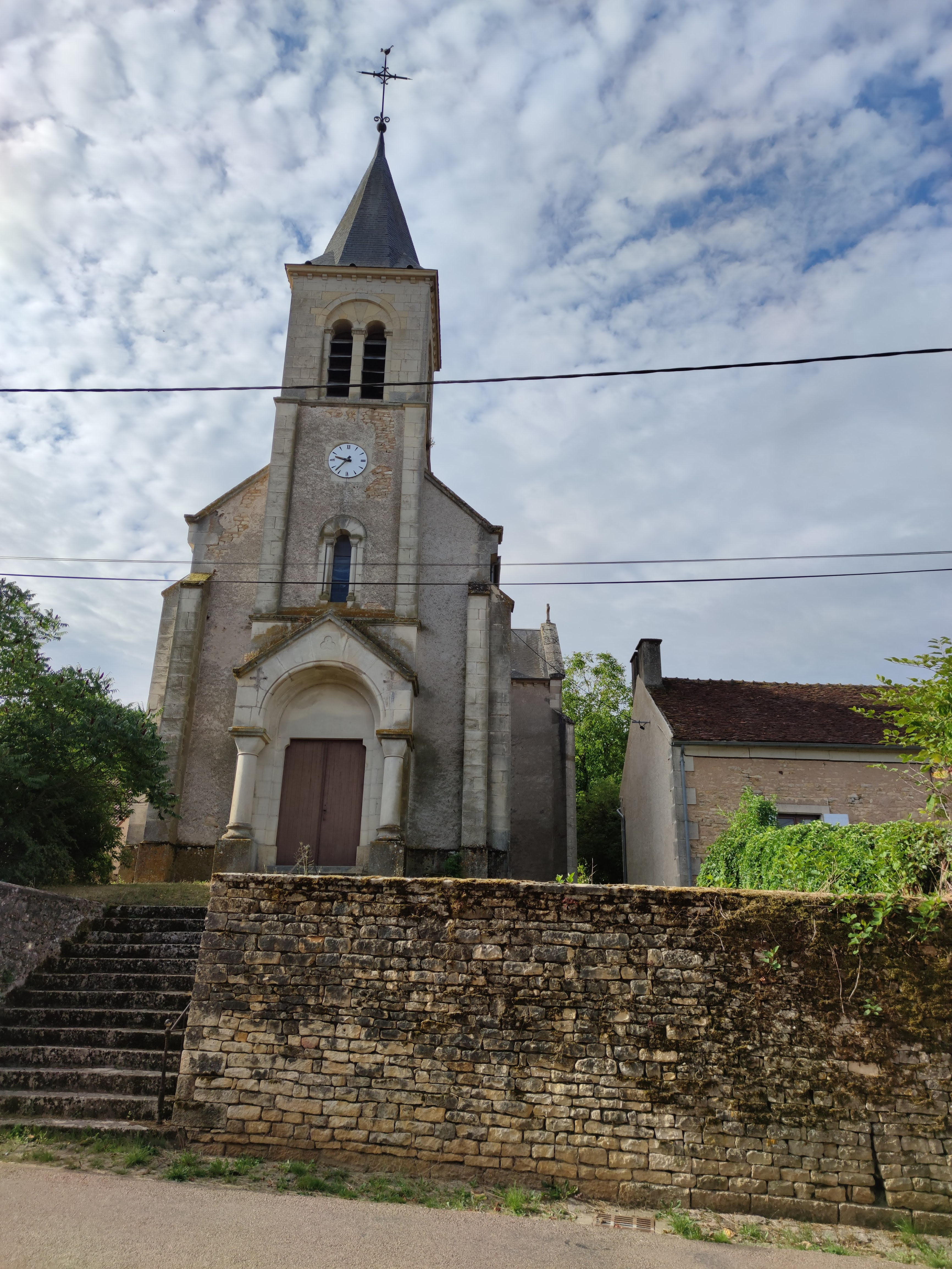 Eglise de Taconnay (Nièvre).